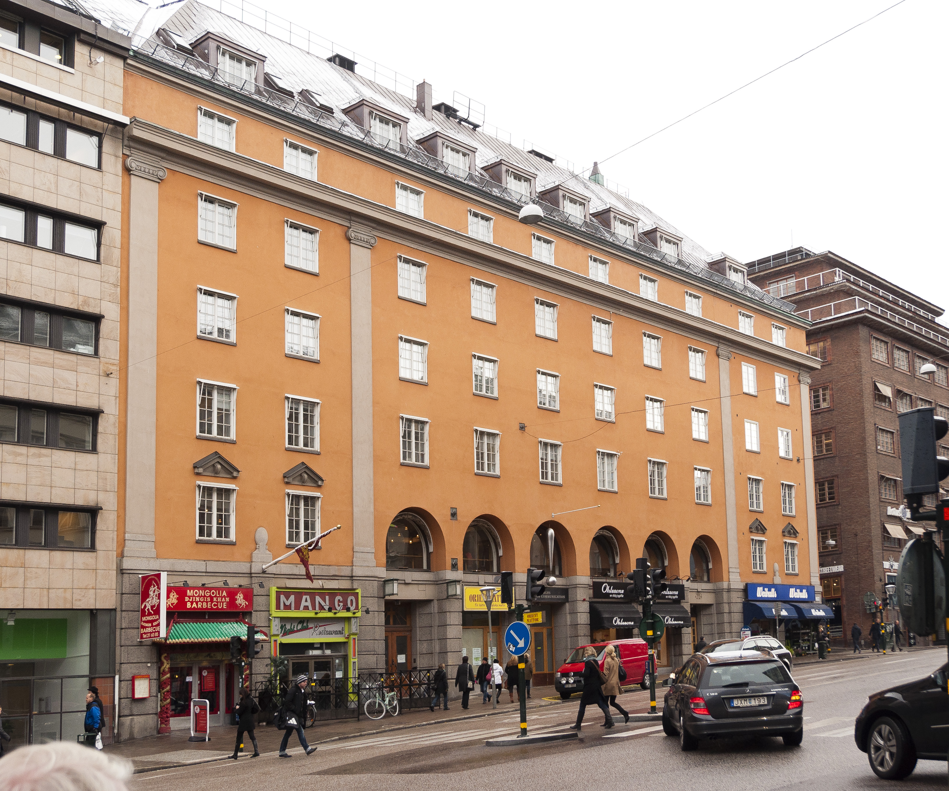 Fyrkanten 11, Sveavägen 32-36, Apelbergsgatan 42. Byggnadsår 1926-27, arkitekt A V Fagerström, byggherre Evangeliska Brödraförsamlingen, byggmästare A Kleist.